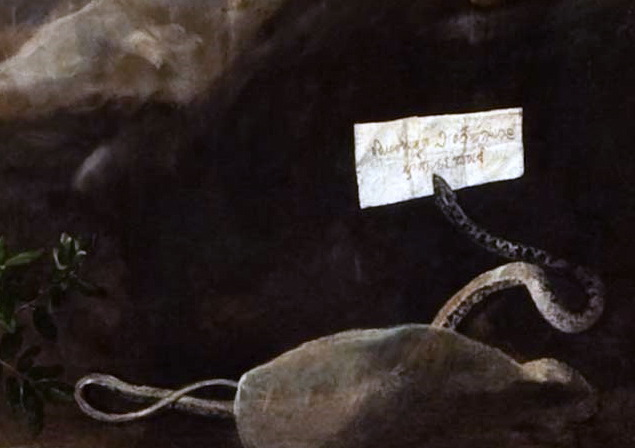 Signatura d'El Greco a "El Martiri de Sant Maurici i els seus companys". És notable el fet que el paper on hi ha la firma estigui sostingut per una sero.